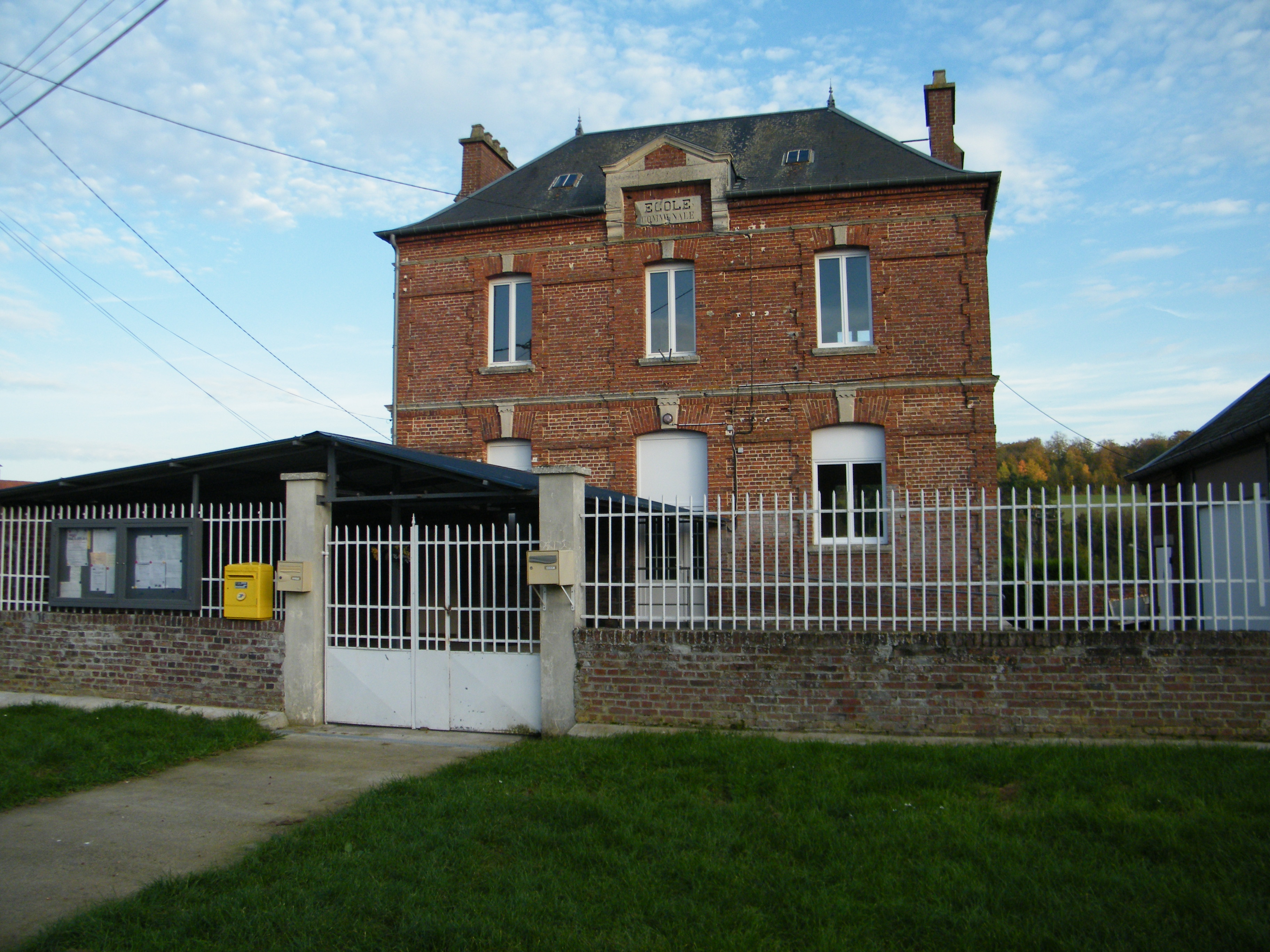 Mairie-école.